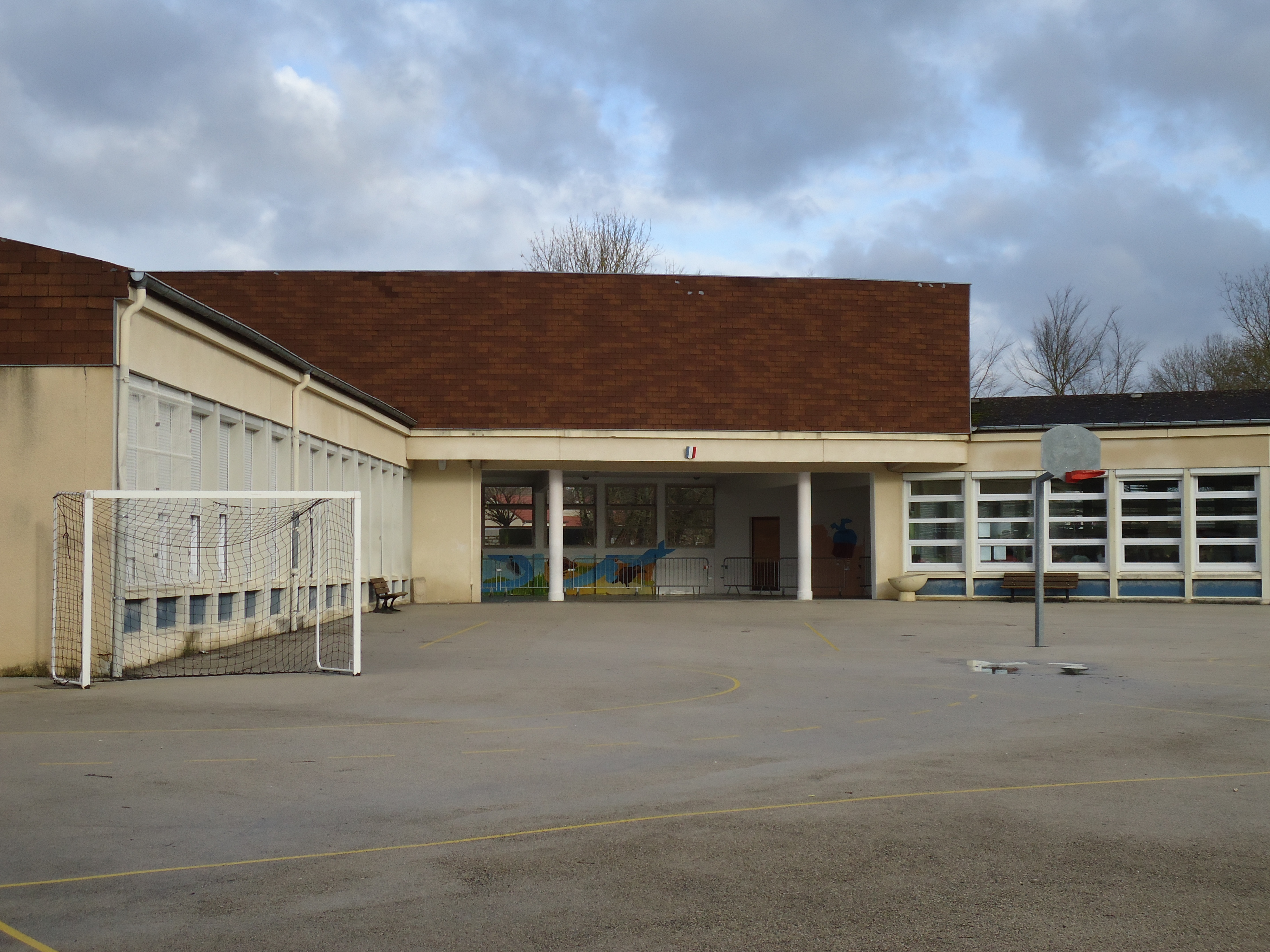 Ecole primaire de Foucherans (39)